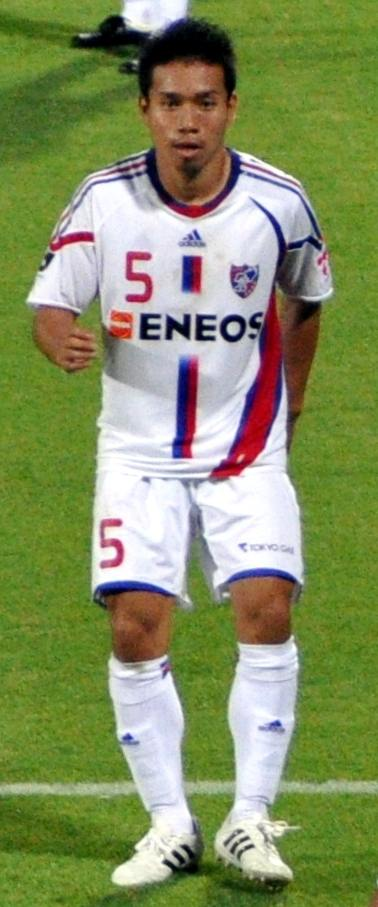 Yuto Nagatomo, cropped fromKashiwa 0 - 3 Tokyo (Goals: Ishikawa, Cabore, Hirayama)